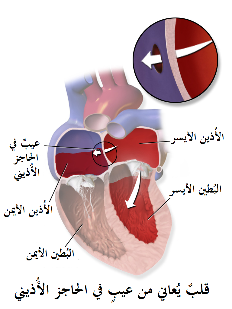 قلبٌ يُعاني من عيبٍ في الحاجز الأُذيني.